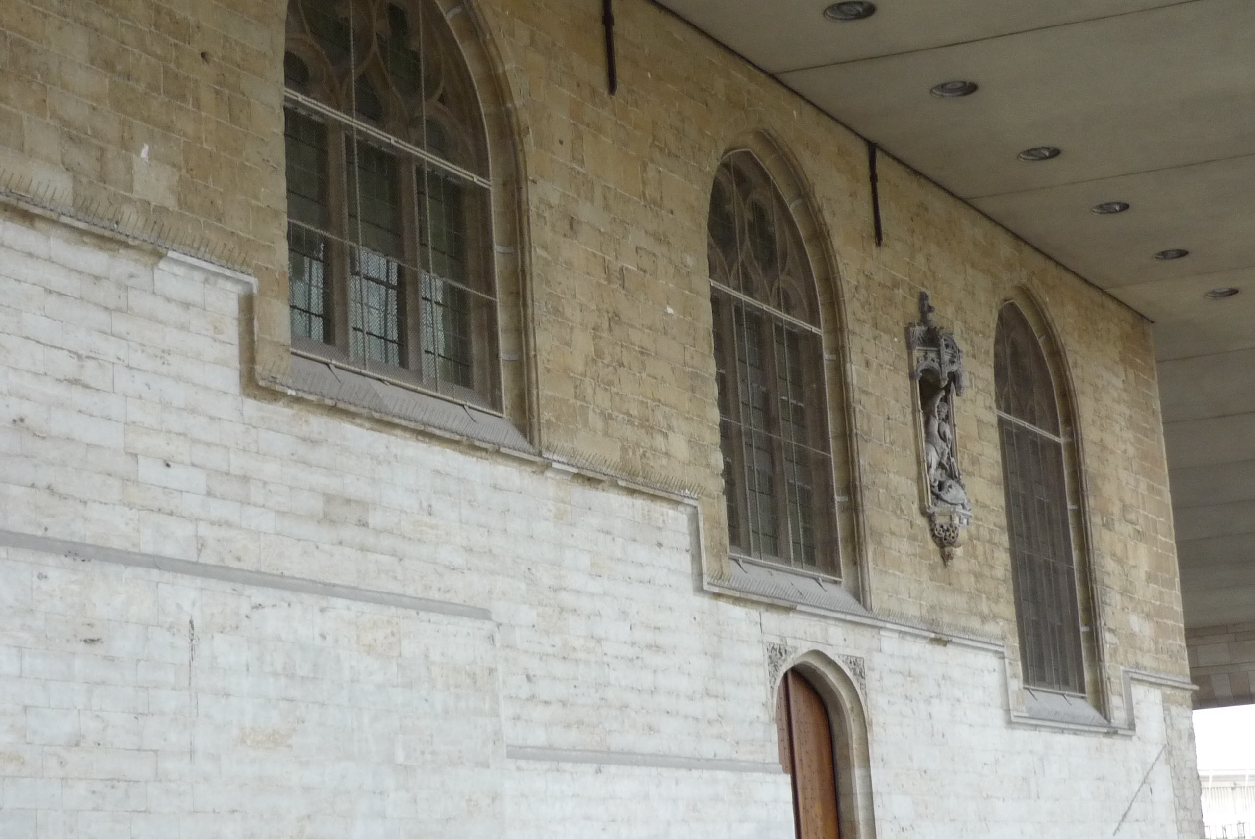 Chapelle Van Duvenvoorde, appelée aussi chapelle de Nassau, incluse à l'intérieur de la Bibliothèque Royale de Bruxelles, construite en 1346 par Guillaume van Duvenvoorde.